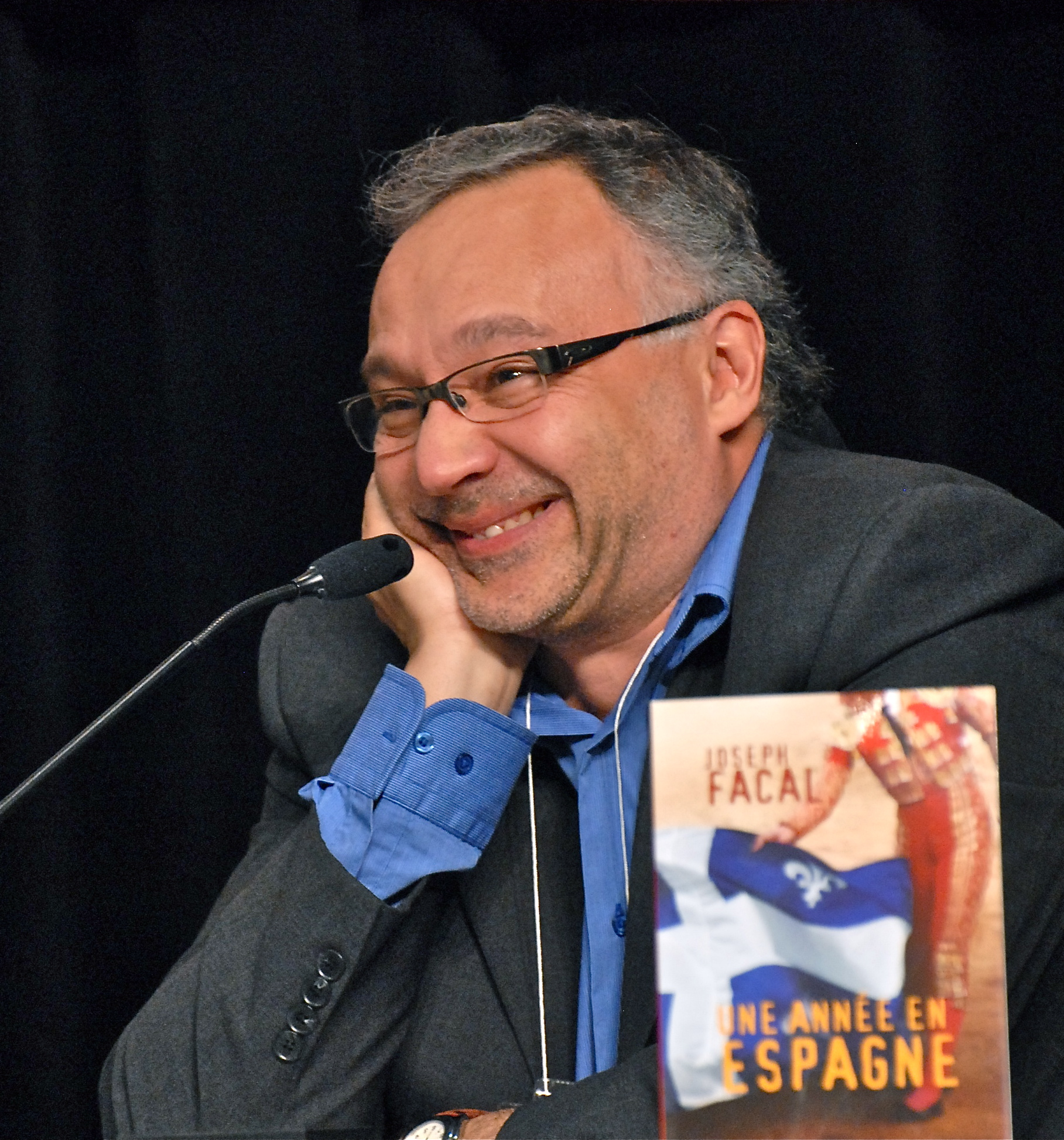 Joseph Facal, lors du Salon international du livre de Québec de 2011